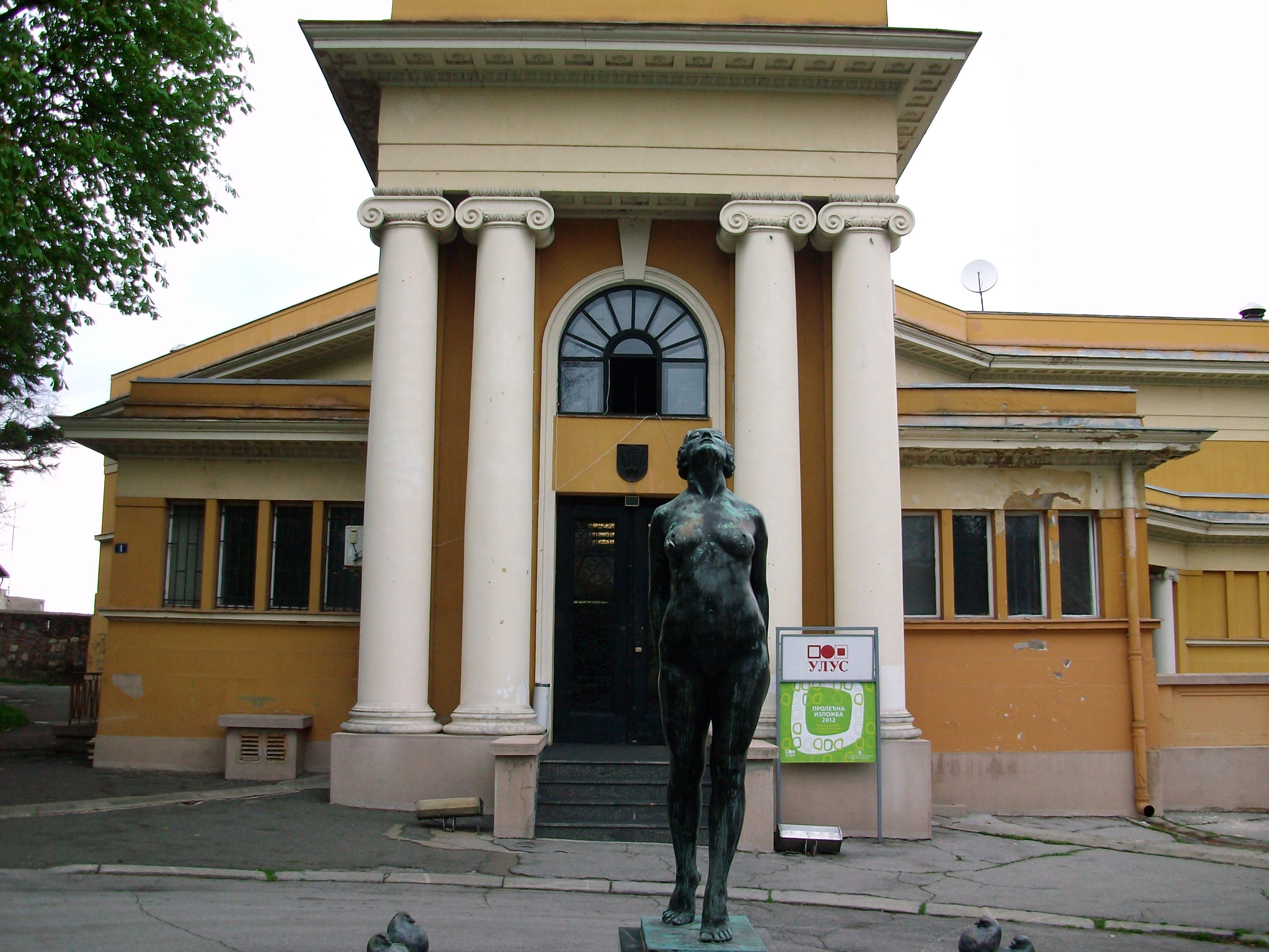 Павиљон Цвијете Зузорић / Pavilion od Cvijeta Zuzorić